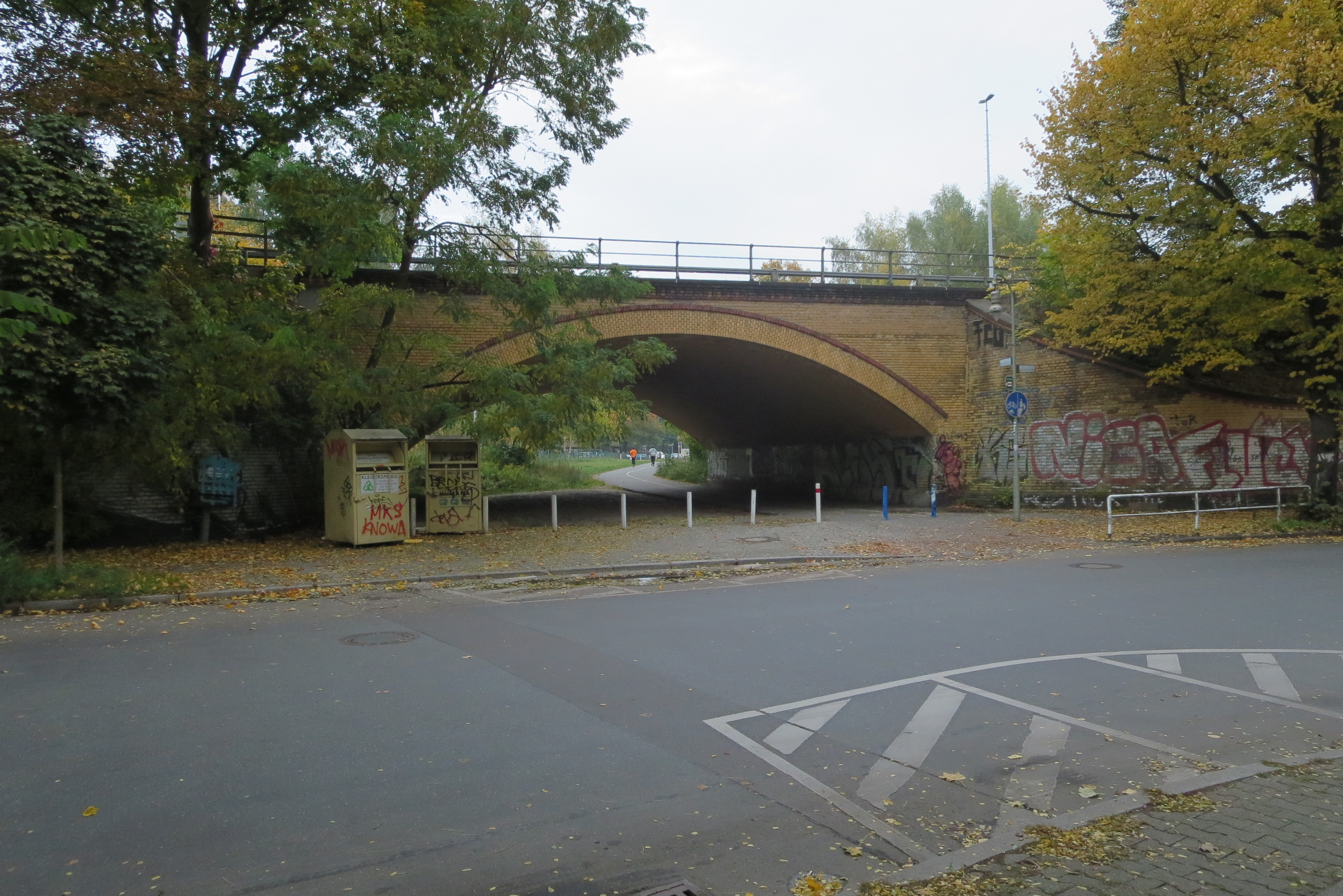 S-Bahn-Brücke Wilhelm-Kuhr-Straße, Blick von Südwesten